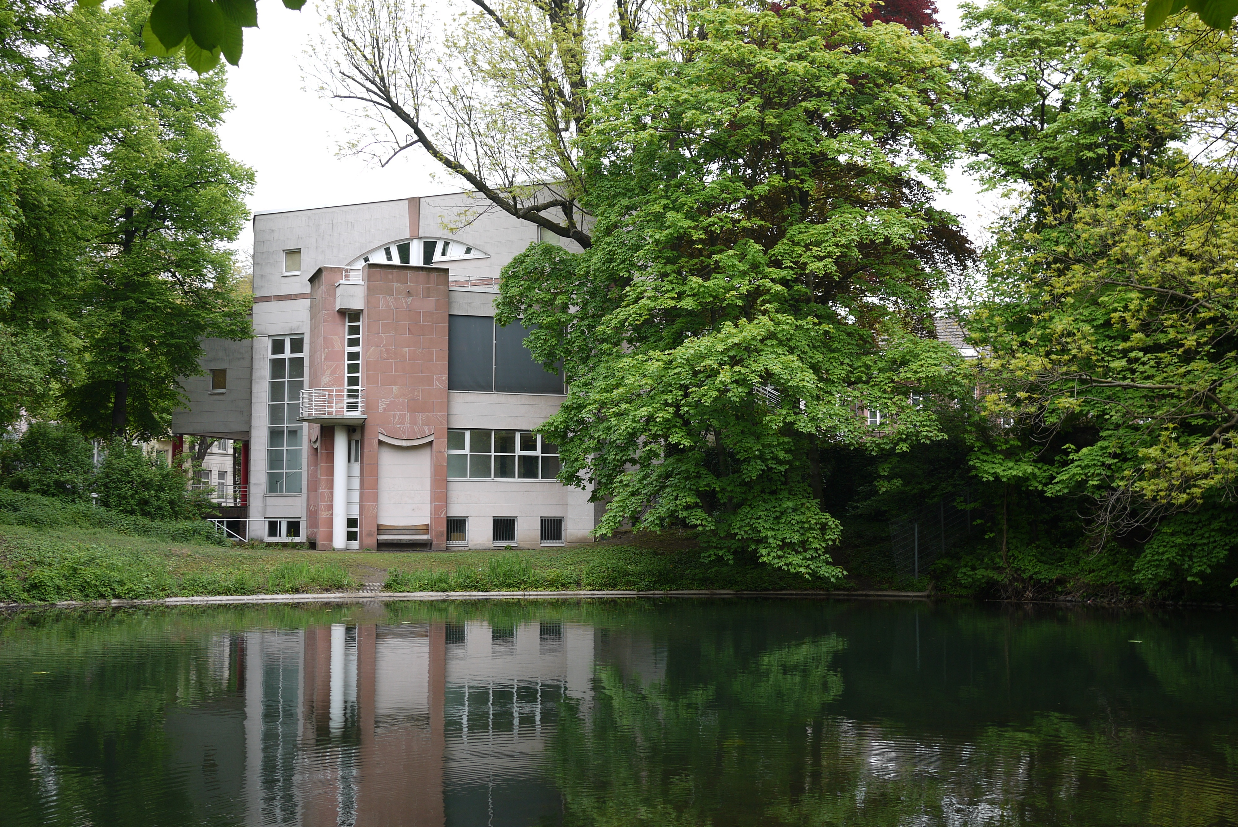 Stadtmuseum DüsseldorfNative nameStadtmuseum Landeshauptstadt DüsseldorfLocationDüsseldorf, GermanyCoordinates51° 13′ 19.68″ N, 6° 46′ 10.14″ EEstablished1874 as Historisches MuseumWebsiteStadtmuseum Düsseldorf